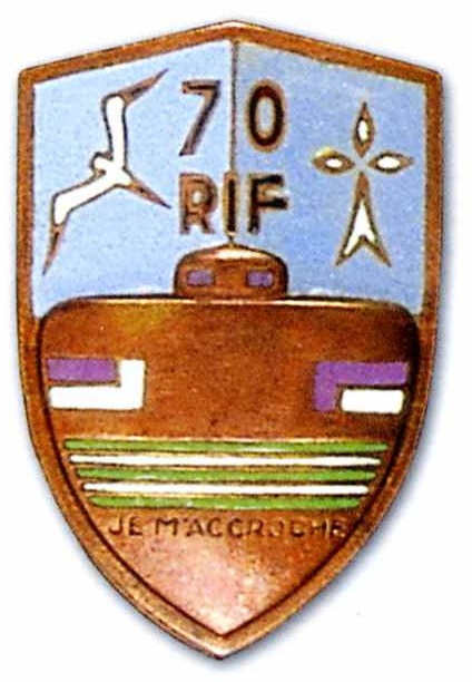 Insigne régimentaire du 70e Régiment d'Infanterie de Forteresse (RIF).